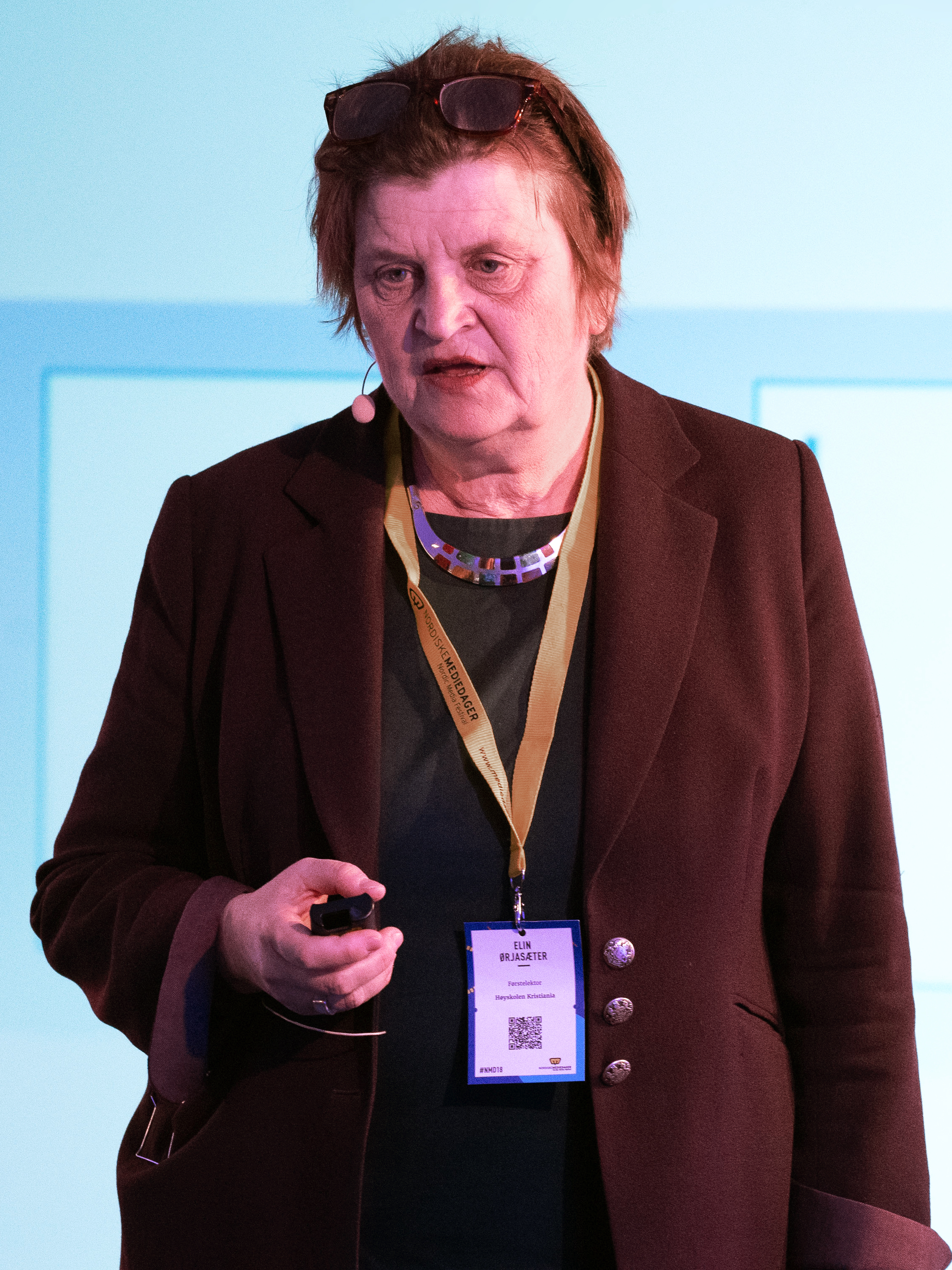 NMD EXPO Høyskolen Kristiania Medvirkende: Elin Ørjasæter.